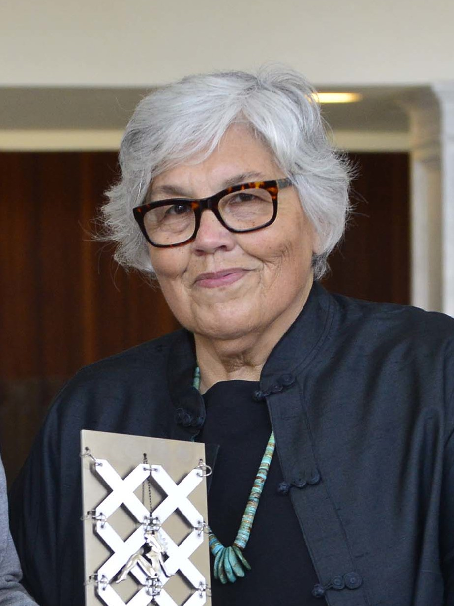 Fotografia: Iñigo Royo